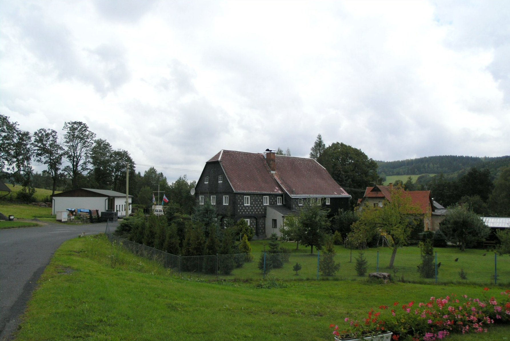 Vilémov